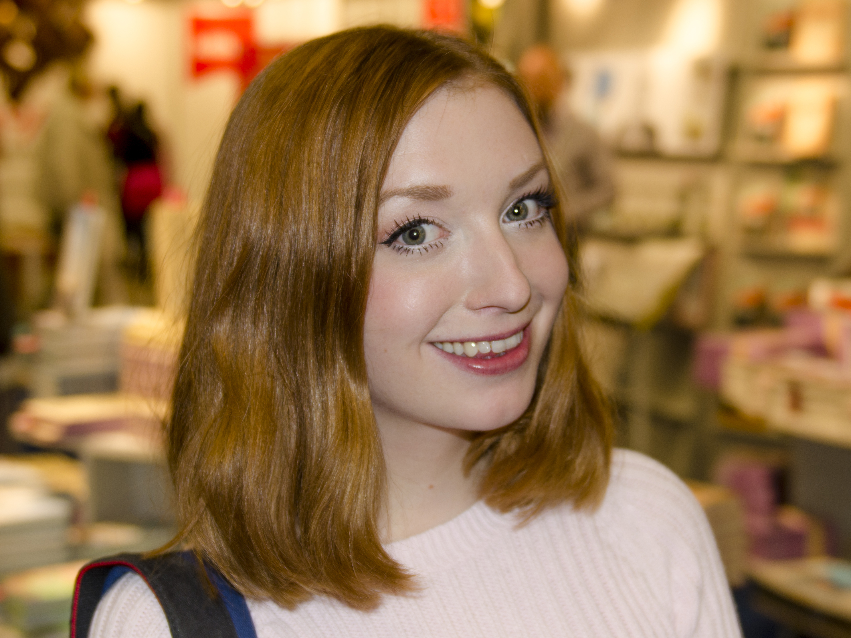 Bloggerskan Sandra Beijer på Bokmässan i Göteborg 2014.